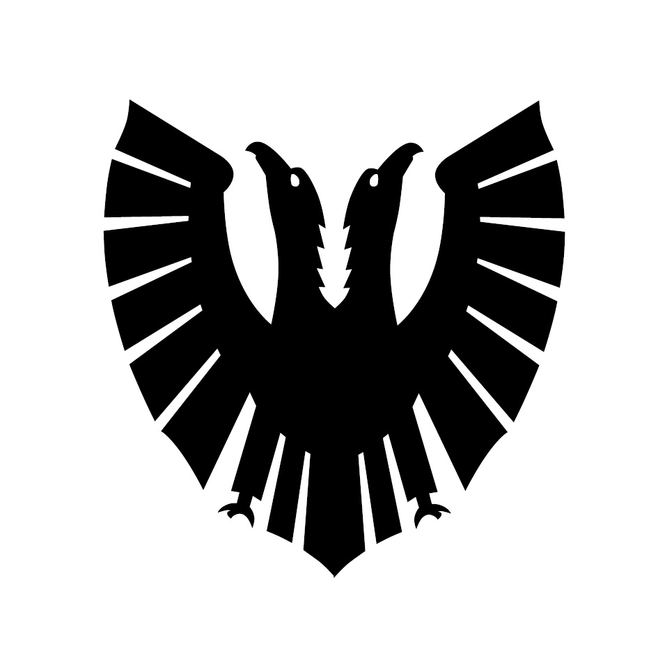 Vereinsabzeichen des LBV Phönix von 1903 e.V.